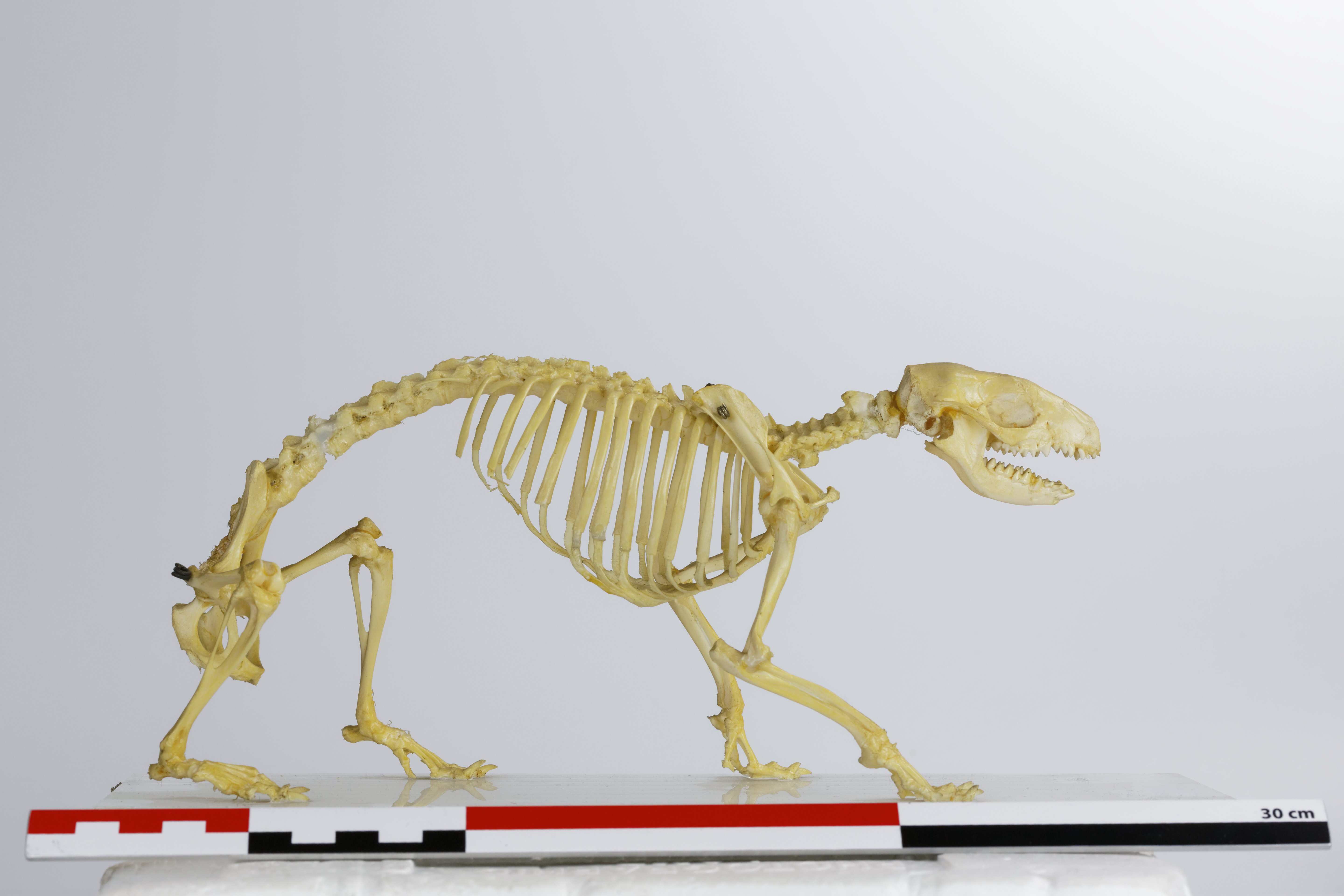 Nom vernaculaire Hérisson commun Nom latin Erinaceus europaeus Nature du spécimen Squelette monté Place dans le règne animal Chordé, Mammifère, Insectivore Provenance Collection de Zoologie de l'Université Pierre et Marie Curie (UPMC) à Paris Dimensions du socle (cm) 27,6 (L) x 10,9 (l) x 0,8 (h) Longueur approximative du spécimen (cm) 25 (donnée non biométrique) (22-27 dans la nature). Hauteur total du spécimen (cm) 10 (donnée non biométrique) Biologie Petit insectivore nocturne recouvert de piquants. On le retrouve dans les forêts tempérées, les prairies et dans les zones urbaines. Il se protège en formant une boule. n squelette d'hérisson commun - Erinaceus europaeus - de la collection de l'Université Pierre-et-Marie-Curie à Paris.